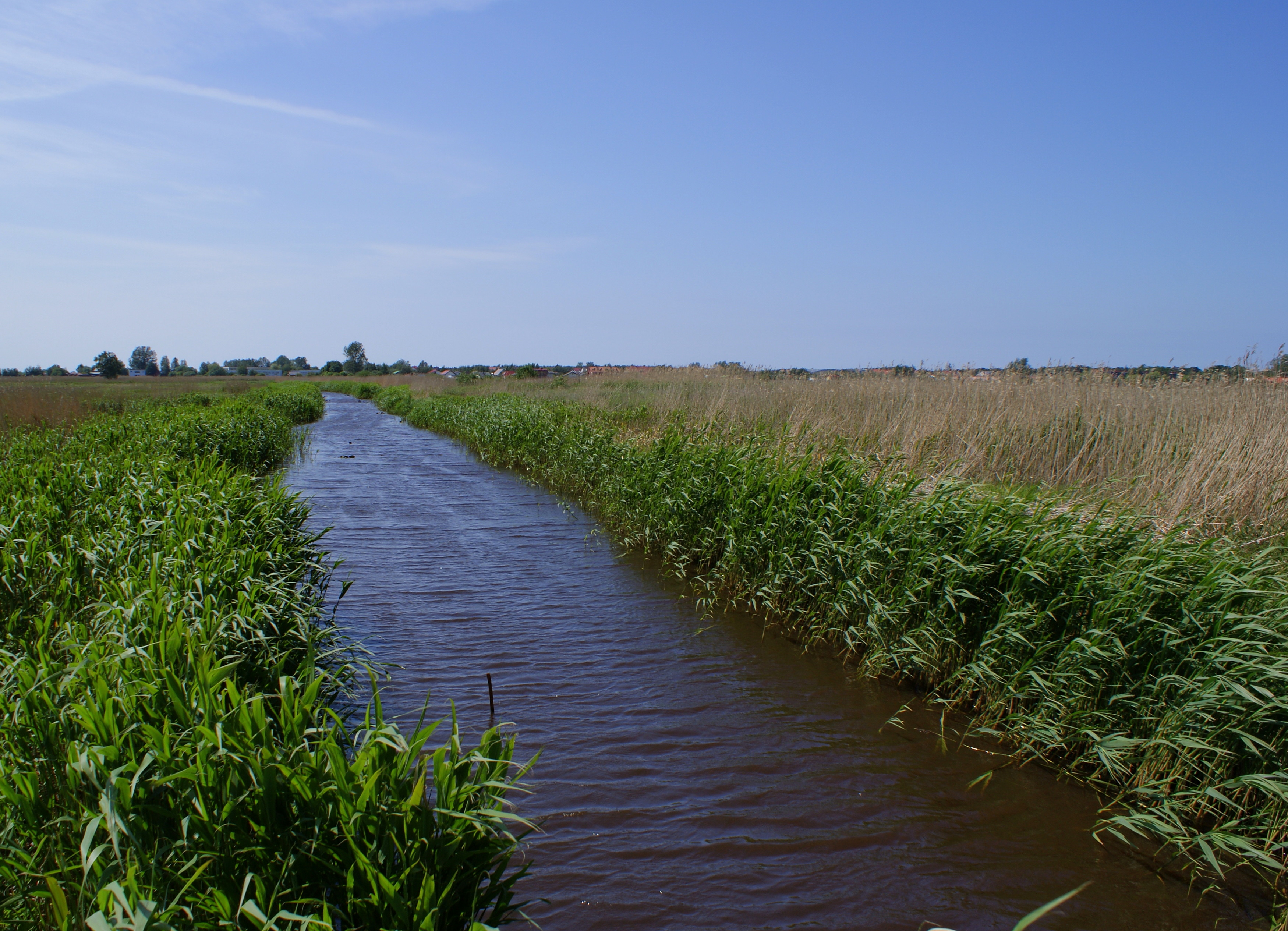 Błotnica (Stara Błotnica) z mostu przed Dźwirzynem - ujęcie na zachód